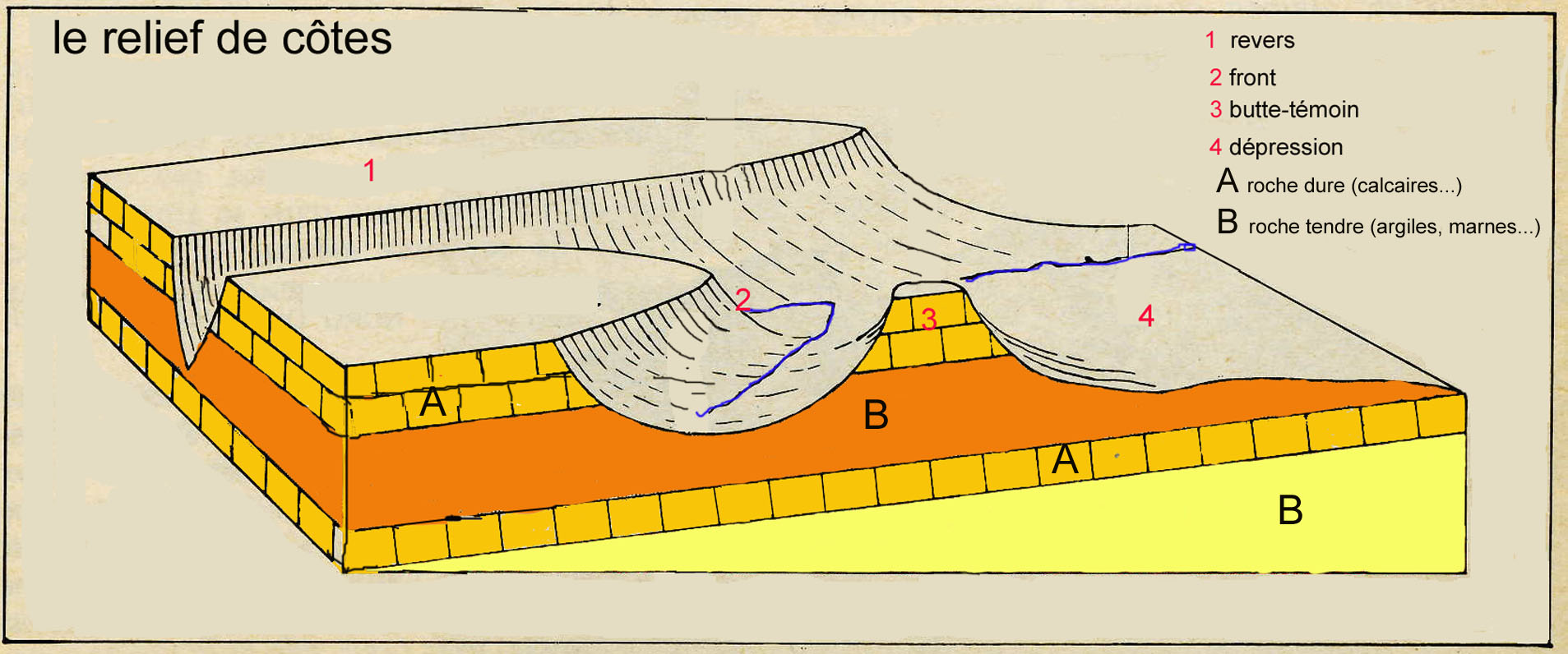 Les principales formes du relief de cuesta, mises en rapport avec la structure des couches de roches.